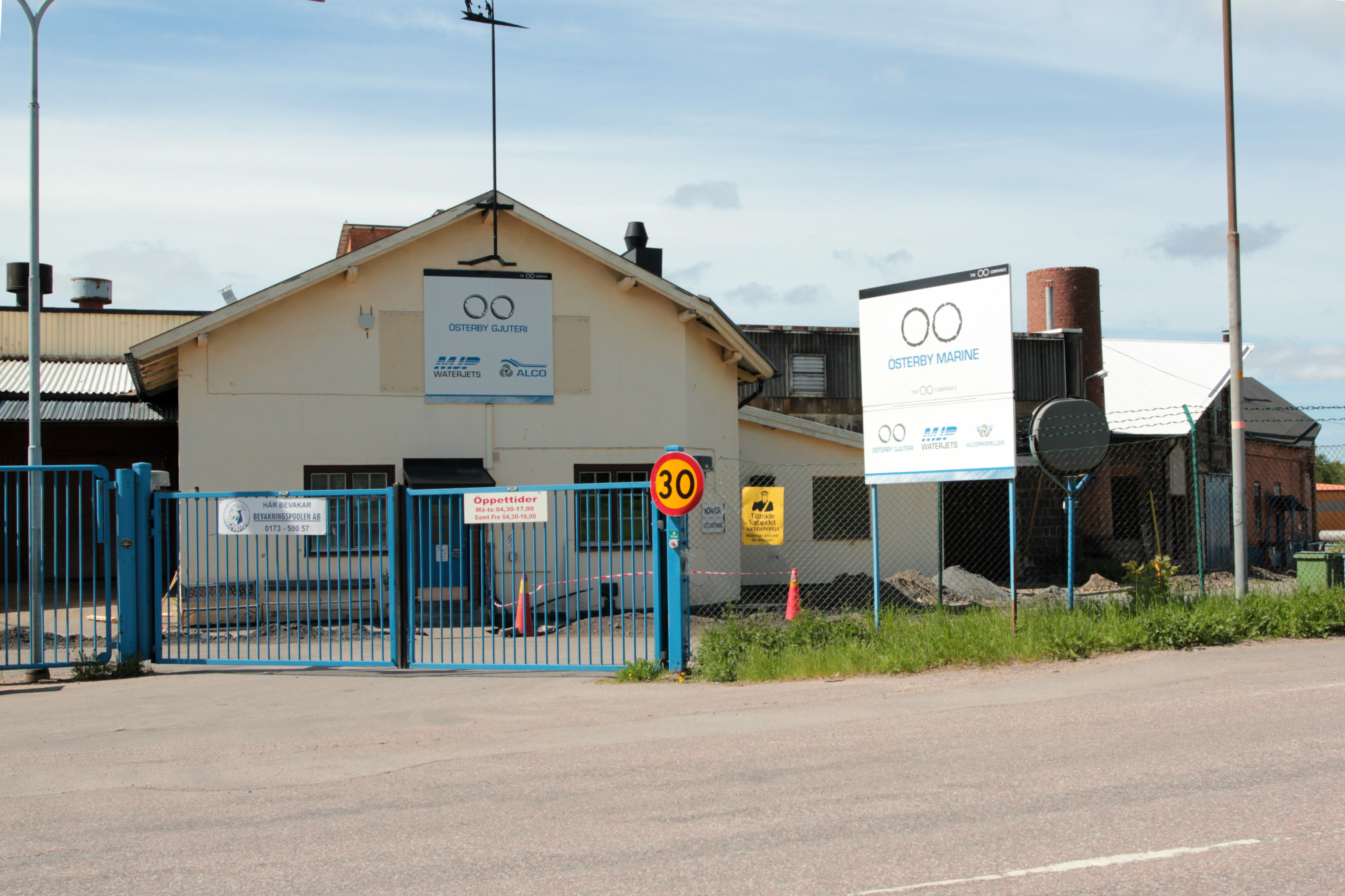 Stålverksområdet, Österbybruk. Foto uppladdat som en del i Bergslagssafarin 26 maj 2012.